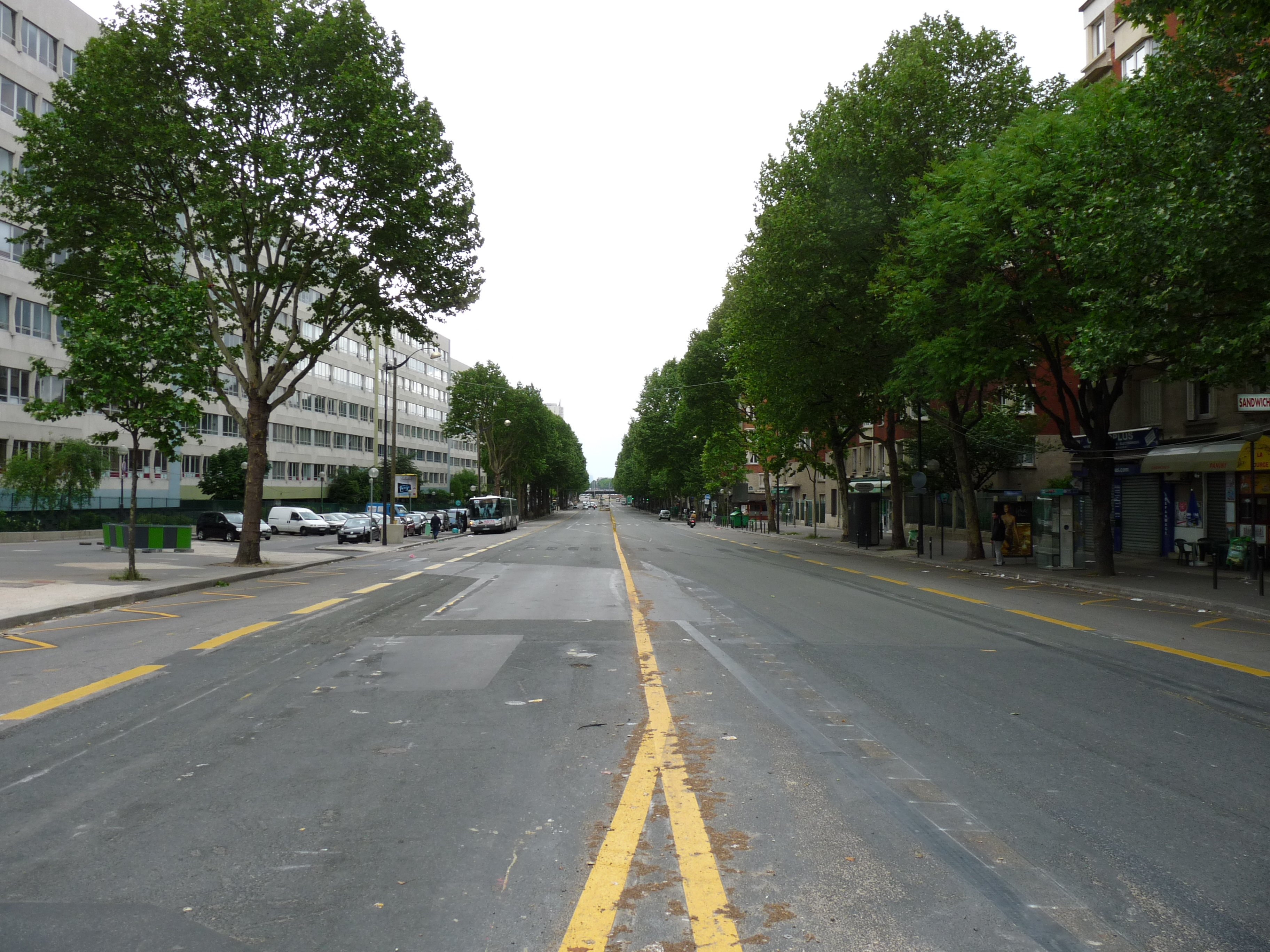 Boulevard Ney à Paris, vue de la porte d'Aubervilliers